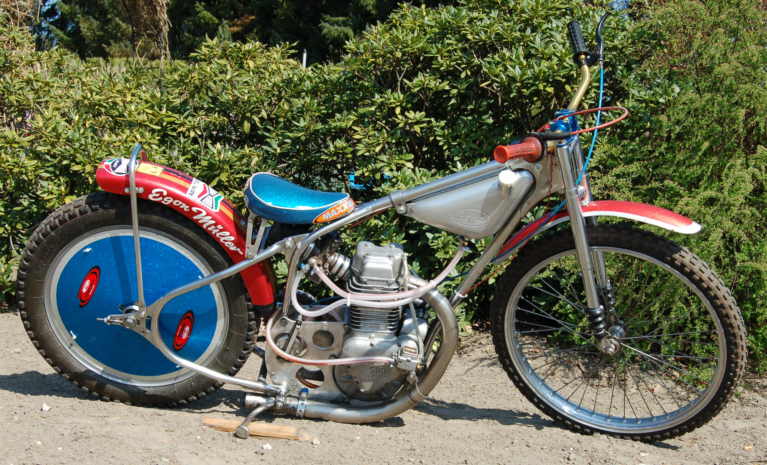 Jawa Speedway Maschine, 500ccm, 2 Ventiler, 4-Takt-Motor mir Dell'Orto Vergaser, ca. 60 PS.